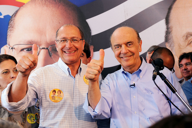 28/08/2010 - Candidato à presidência da República pelo PSDB, José Serra, ao lado de Geraldo Alckmin, durante visita a Ribeirão Preto para inauguração do Comitê Unidos pelo Brasil (Foto Cacalos Garrastazu/ObritoNews) Notícias sobre política, economia, internacional, cidadania, entre outros assuntos. Acompanhe diariamente a Rede Brasil Atual